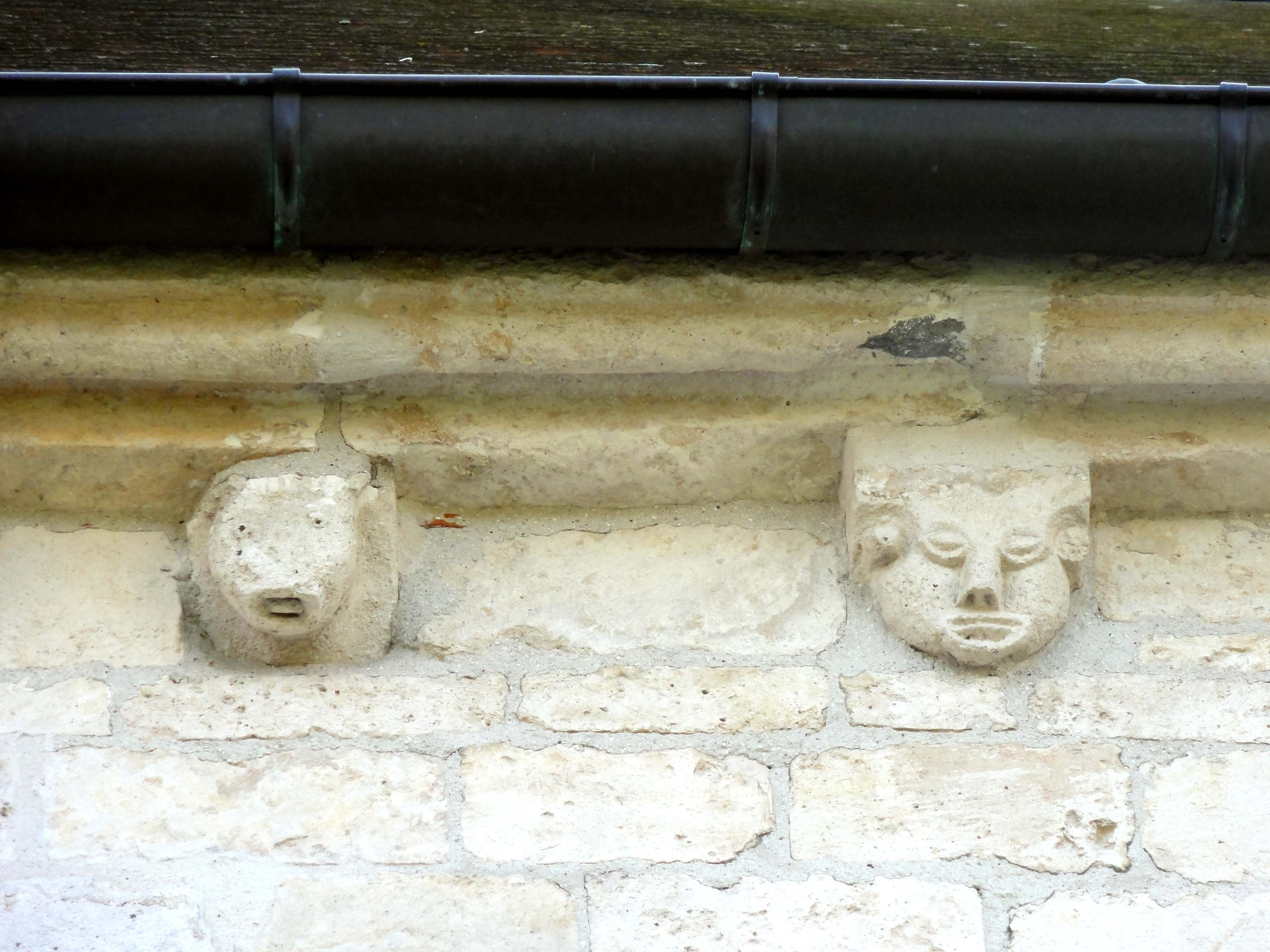 Église Saint-Denis de Bornel - voir titre.